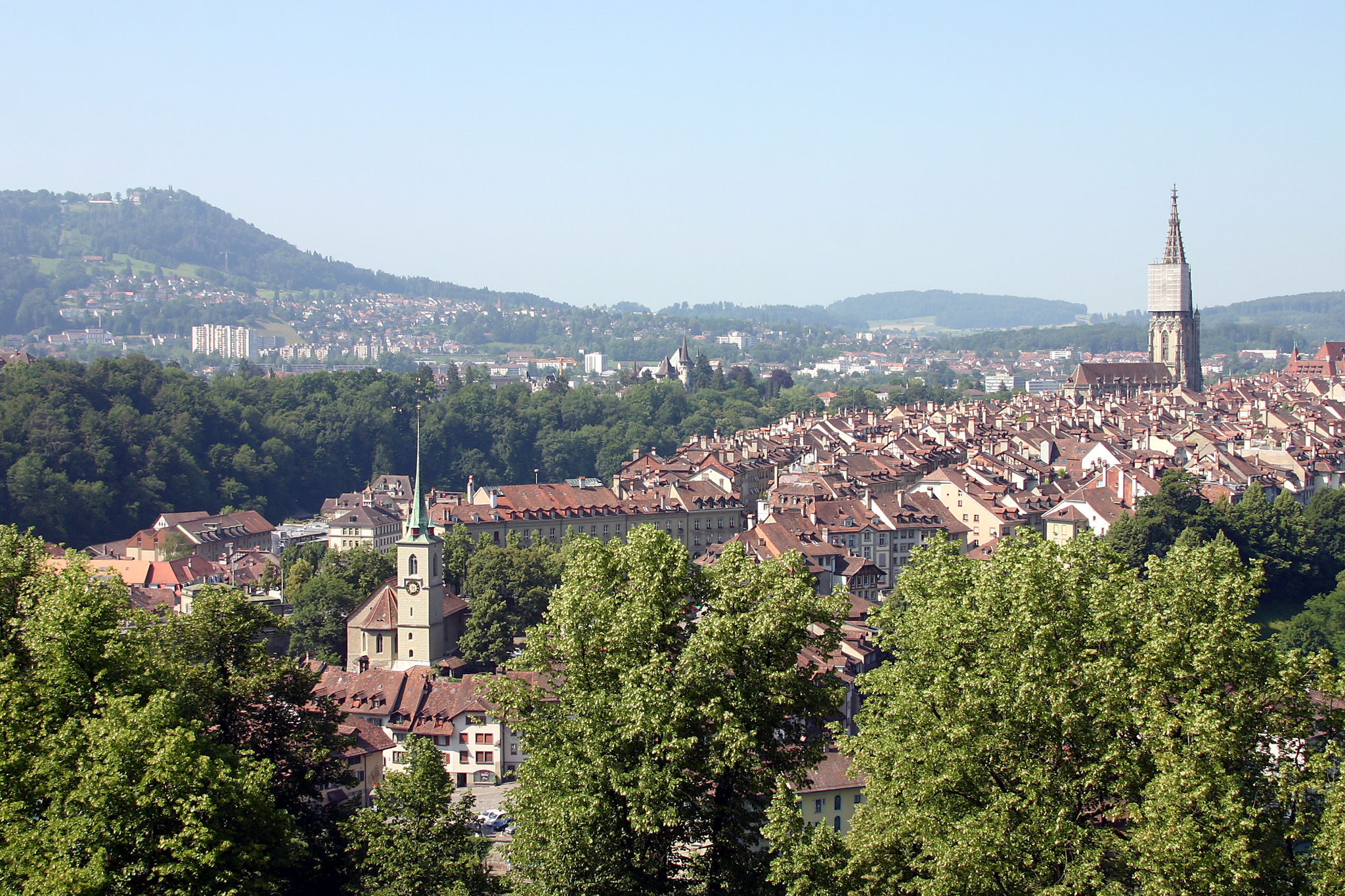 Rosengarten Bern, Blick auf die Altstadt mit Münster und Nydeggkirche. In der Bildmitte oberhalb der Bäume sieht man das historische Museum, links im Hintergrund den Gurten.